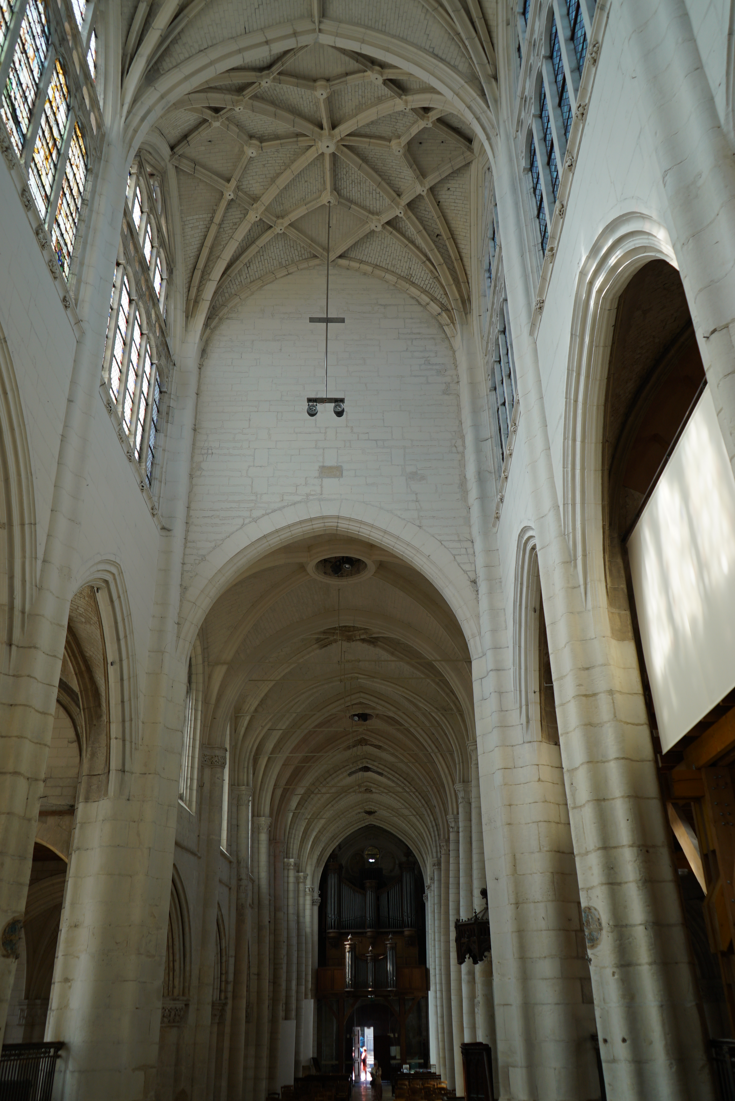 intérieur de l'église avec le décrochement entre le chœur et la nef.